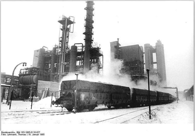 ADN-ZB-Lehmann-16.1.85-kb-Bez. Halle: Kohleversorgung- Der aus 17 Waggons bestehende Kohlezug wurde im Tagebau Profen für das Chemiekombinat Buna beladen. Vor dem Einbunkern mußte er aufgetaut werden. Täglich werden 10.000 Tonnen Rohbraunkohle benötigt, um stündlich 1.300 Tonnen Produktionsdampf zu erzeugen. In engem Zusammenwirken von Eisenbahnern und Kraftwerkern sichern die Werktätigen des Chemiekombinates Buna die notwendige Produktion von Netzdampf.